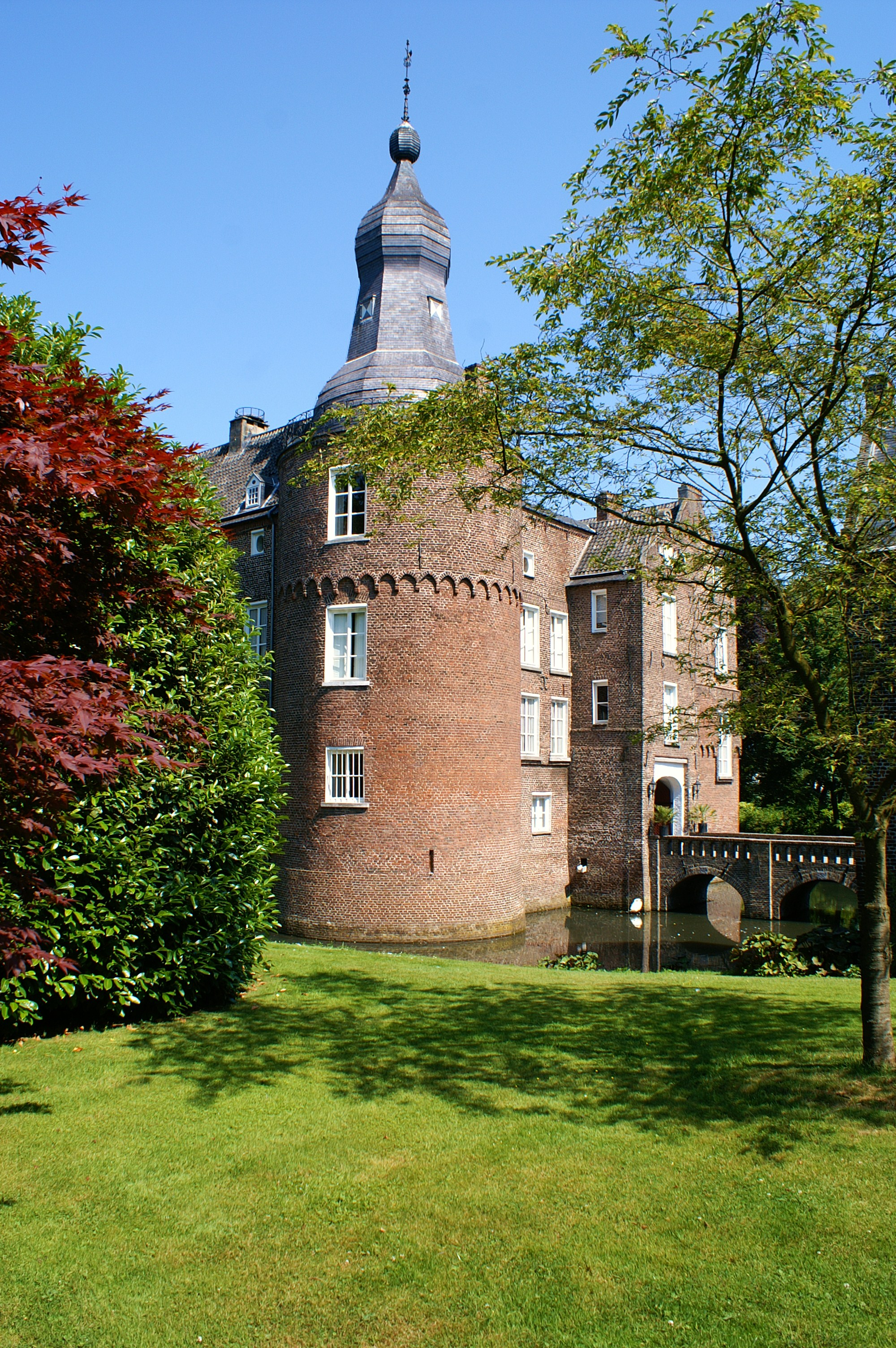 De hoofdburcht van slot Well te Well wordt met een brug verbonden met de voorburcht.